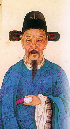 描述摘要 - 張居正畫像 ; 來源: Image:Zhu-Minister1.jpg 圖片描述頁 ; 德文維基之上傳者為 Benutzer:Louis le Grand ; 本檔案其他版